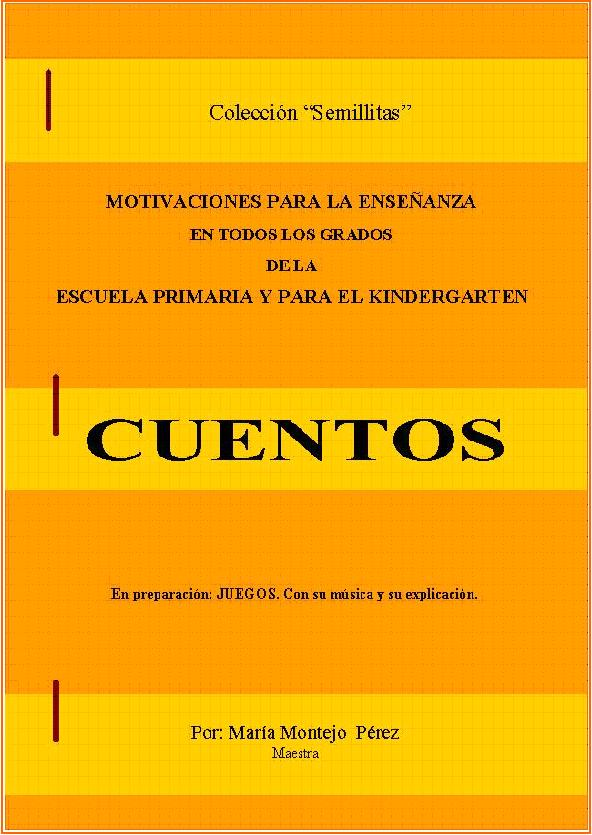 Imagen del libro Semillitas, de María Montejo Pérez